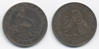 España 5 Céntimos 1870